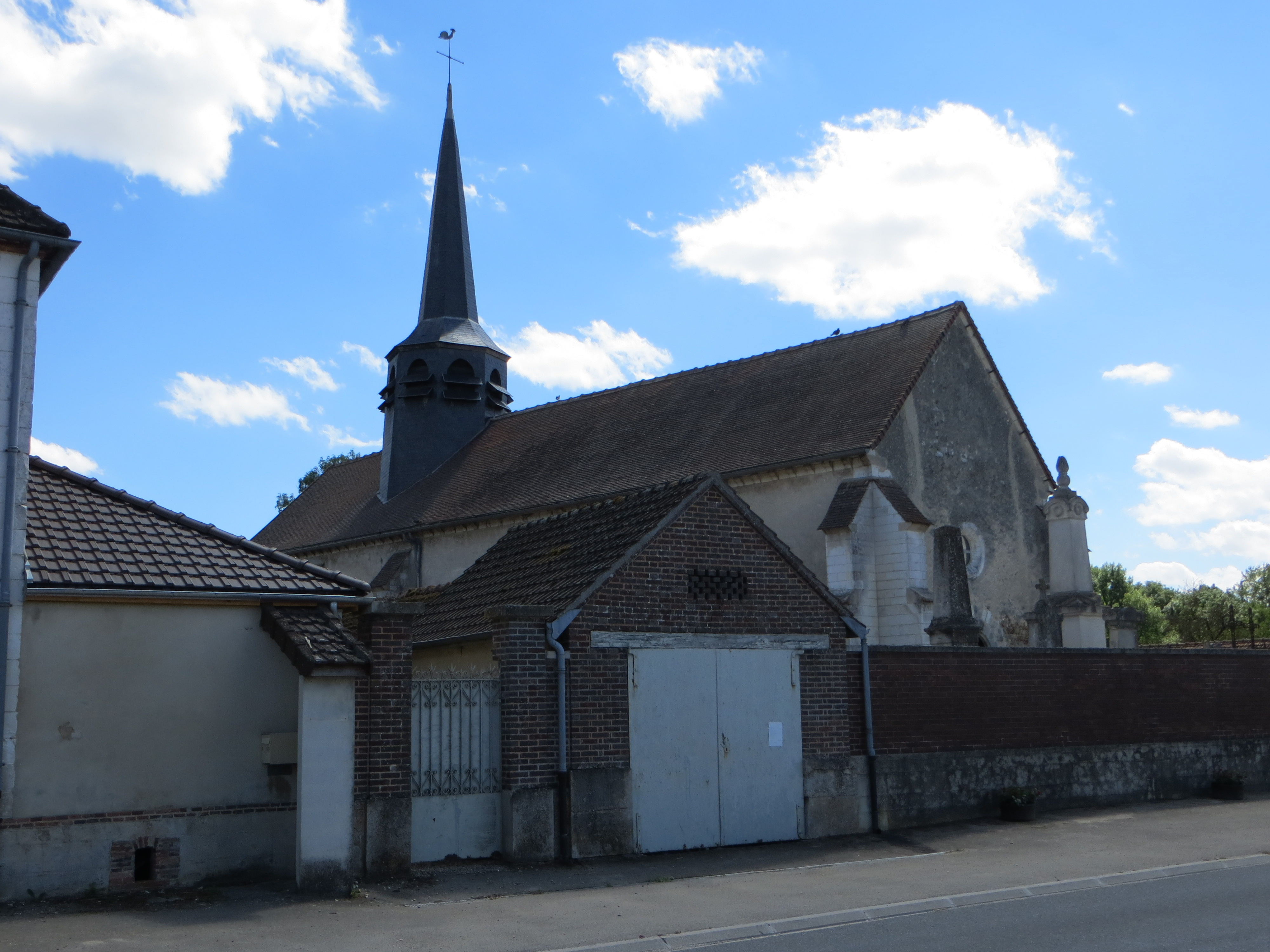 Vue générale de l'église